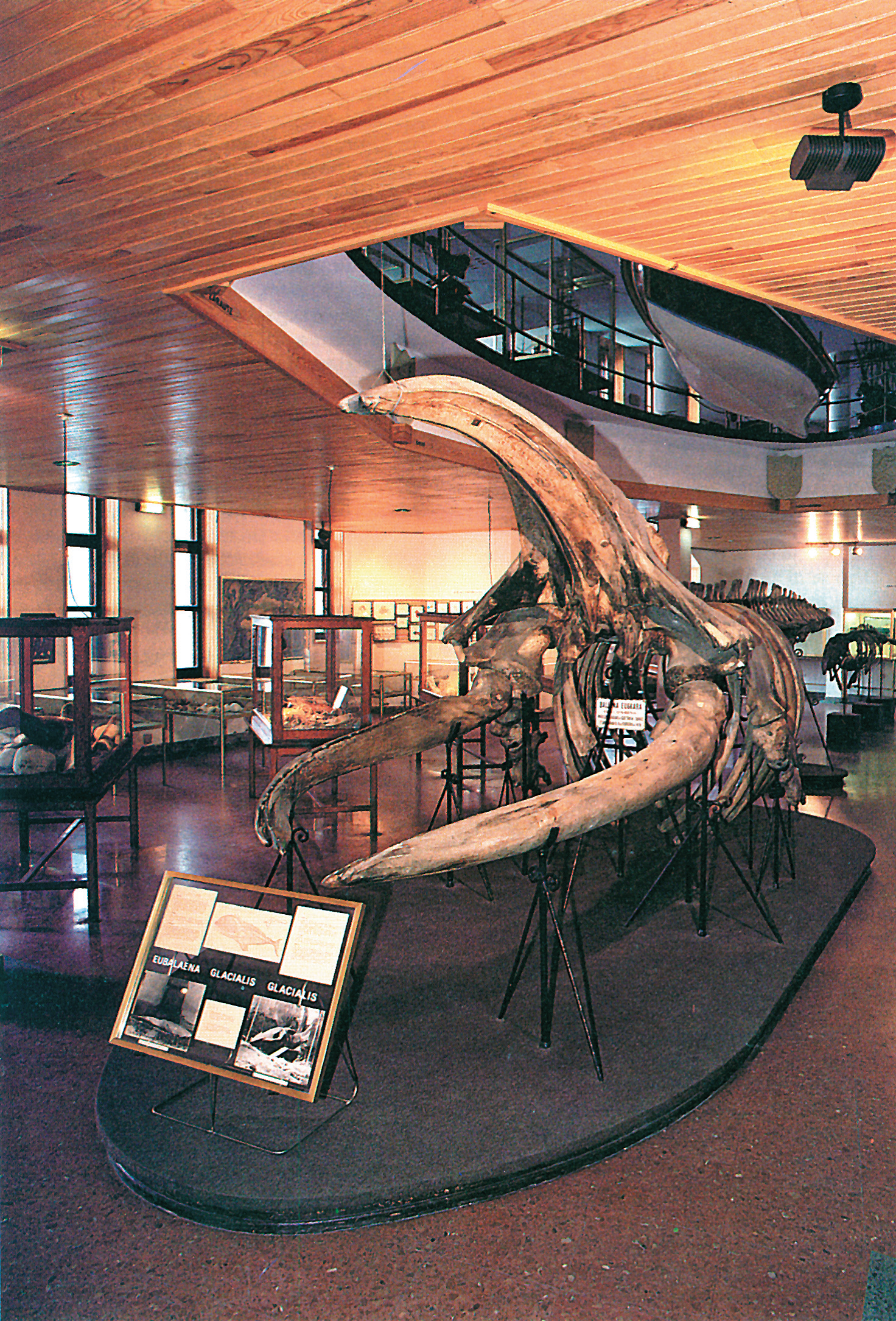 Orioko balea Donostiako Aquariumen